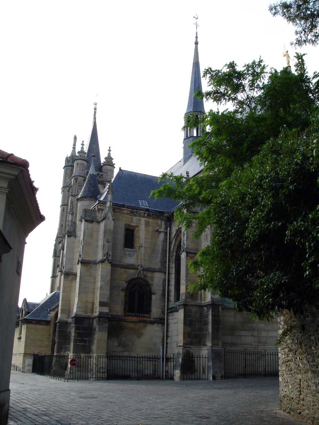 Chevet de la collégiale saint-Martin de Montmorency, Val-d'Oise (France)